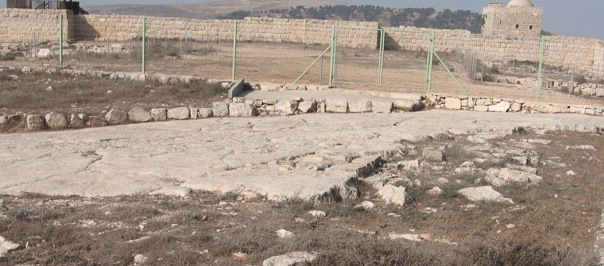 תרבות השומרונים בהר זריזים